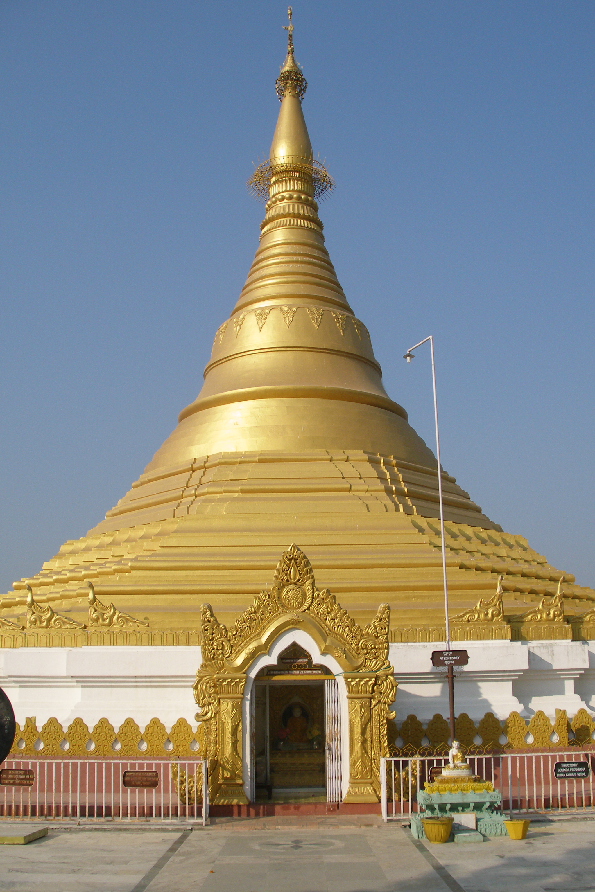 Lumbini